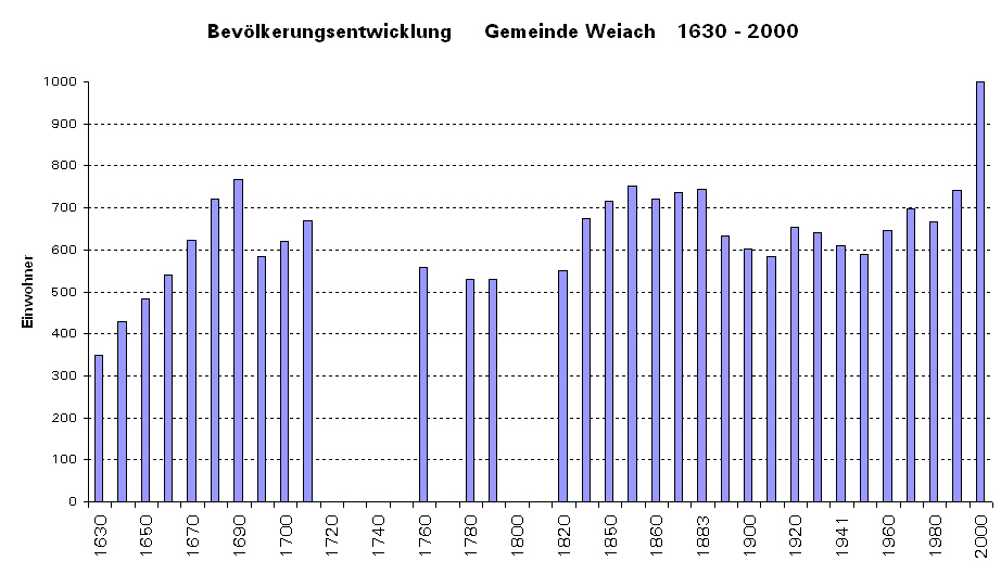 Bevölkerungsentwicklung von Weiach 1600–2000. Die Daten sind besonders in den ersten drei Jahrhunderten interpoliert und beruhen auf den im Artikel Weiach publizierten Werten.